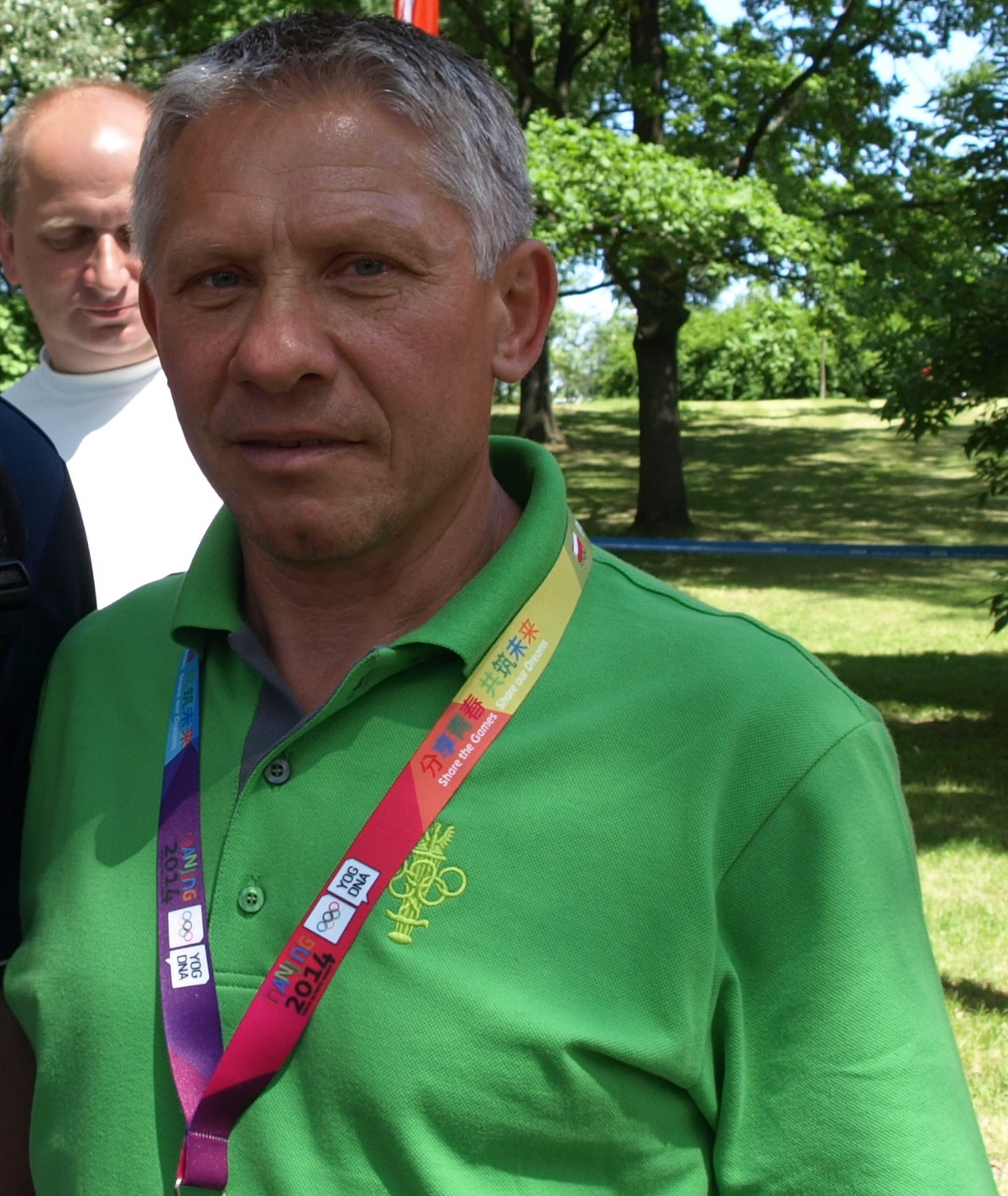 Kazimierz Adach